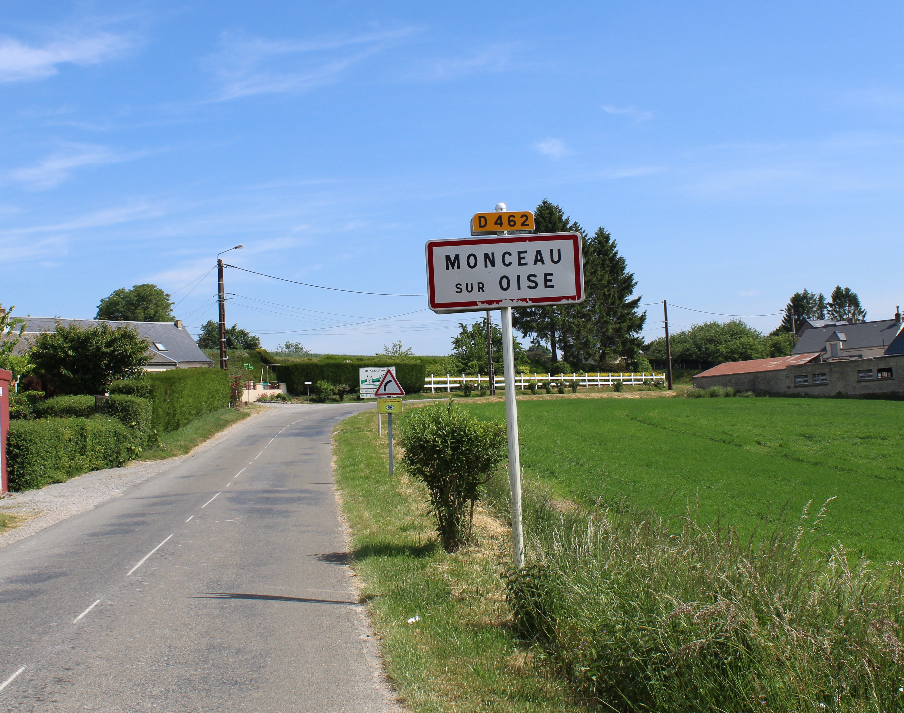 Entrée du village